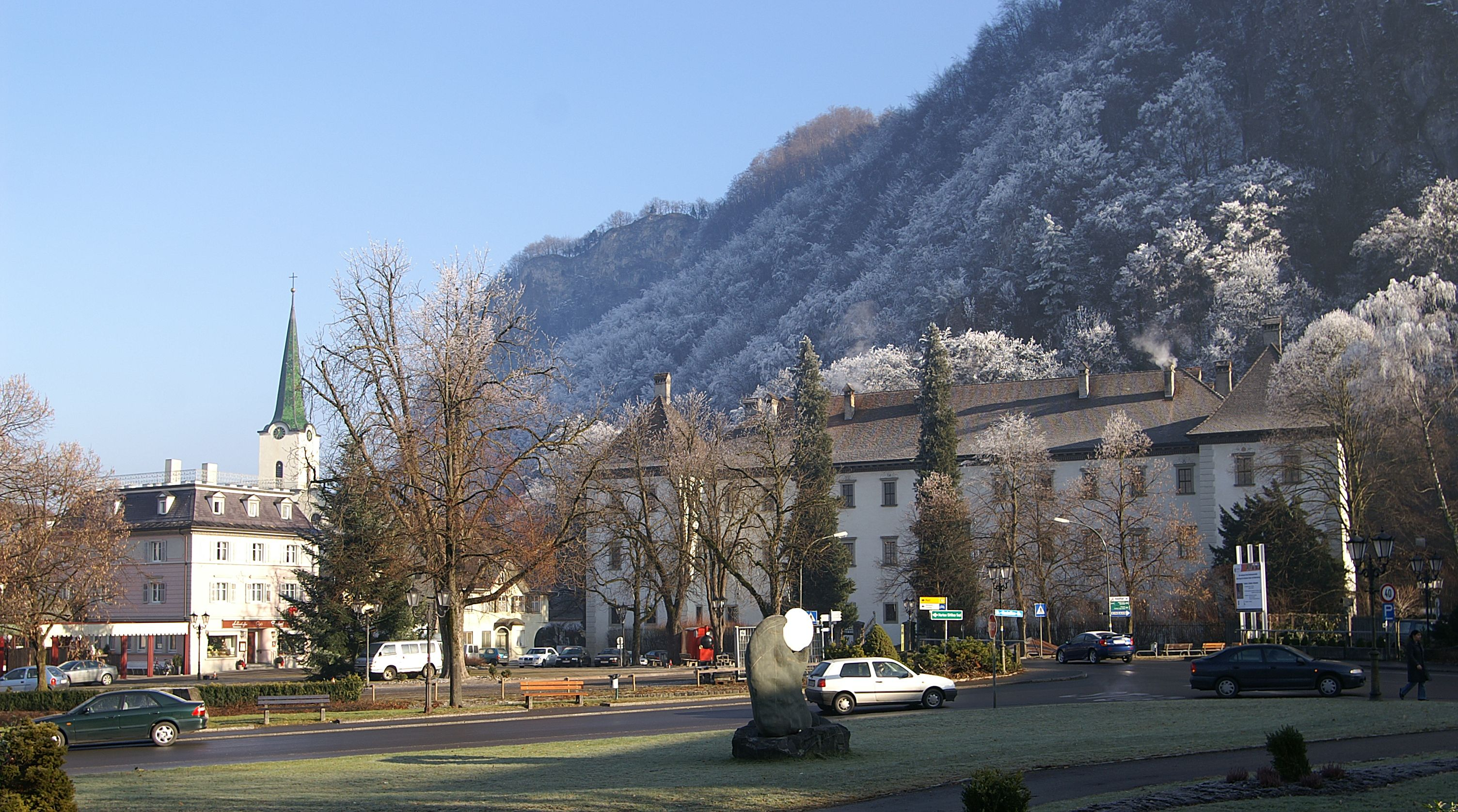 Winter im Zentrum von Hohenems, Vorarlberg